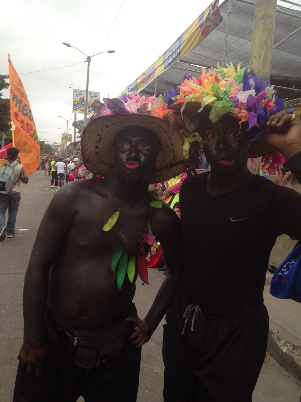 Negros de Cangurú - Carnaval de Barranquilla